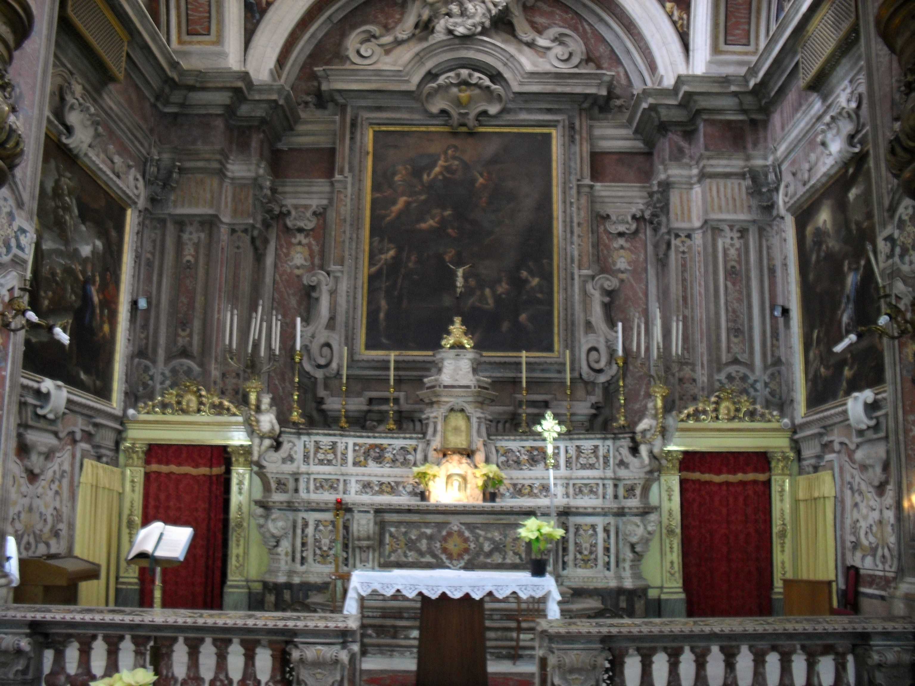 altare di santa maria egiziaca all'olmo (napoli)